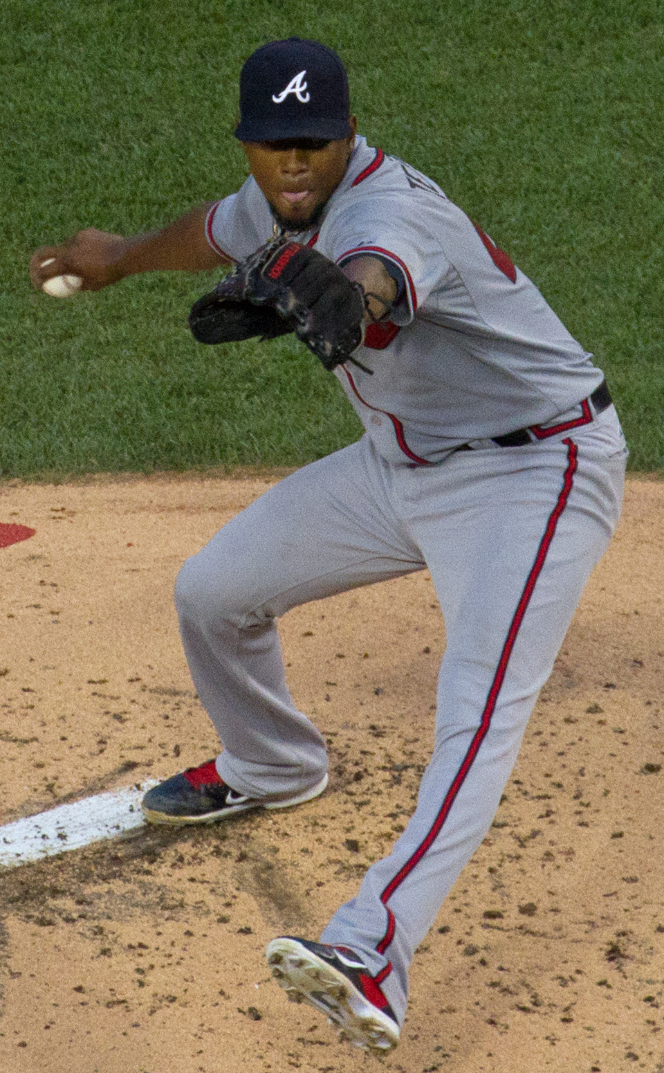 Julio Teherán